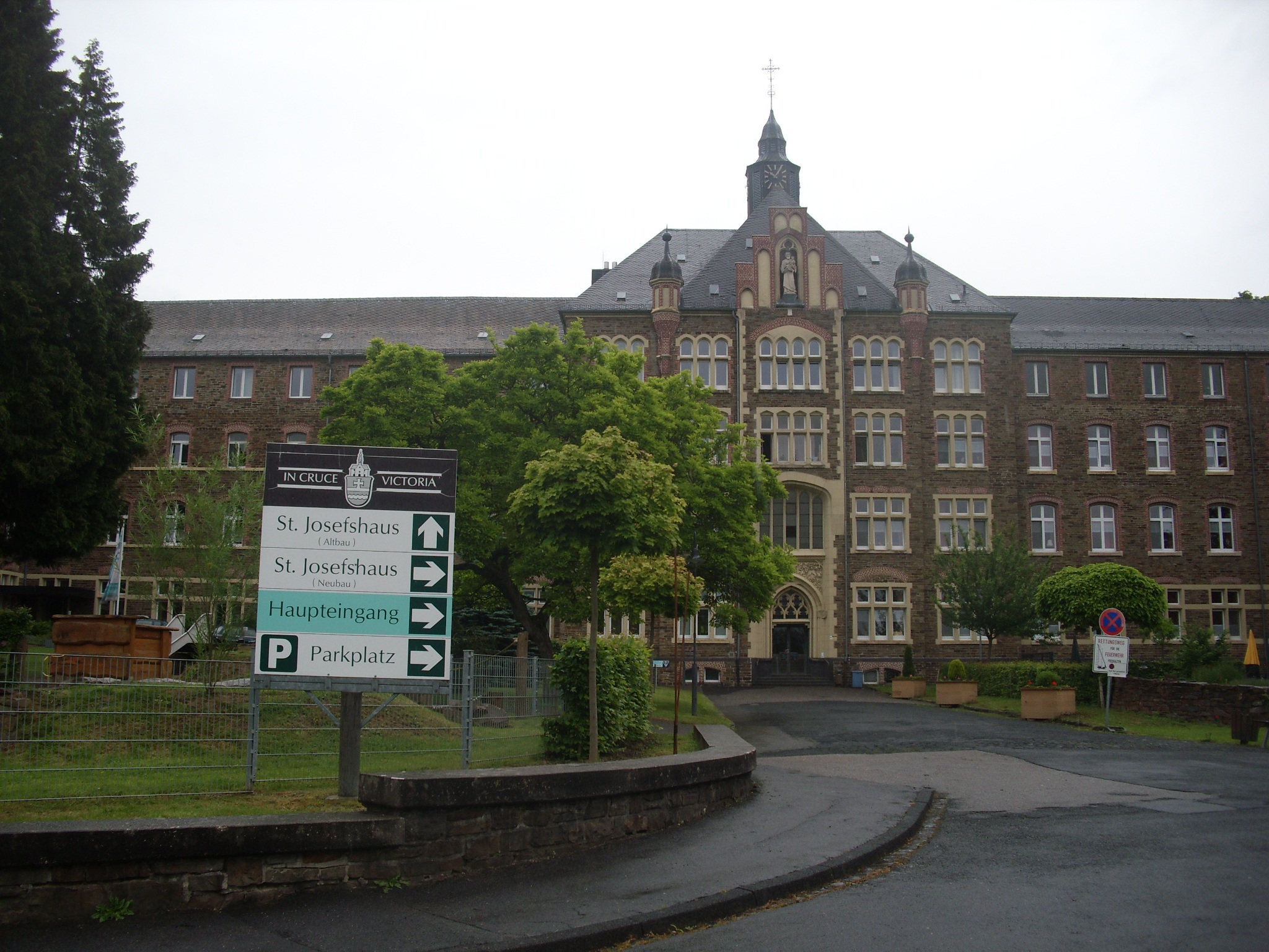 St. Josefshaus - Hönninger Straße 2-18 - Hausen - Verbandsgemeinde Waldbreitbach - Landkreis Neuwied - Rheinland-Pfalz - Deutschland